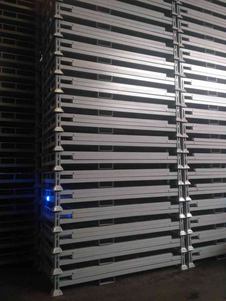 Поддон для хранения шин. Может складываться для хранения. Поддоны могут составляться один на другой в сложенном и разложенном виде.